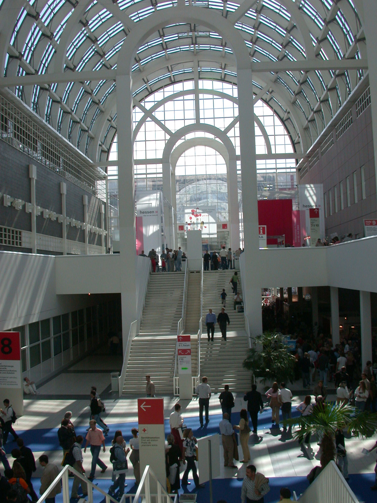 Die Galeria auf dem Messegelände Frankfurt